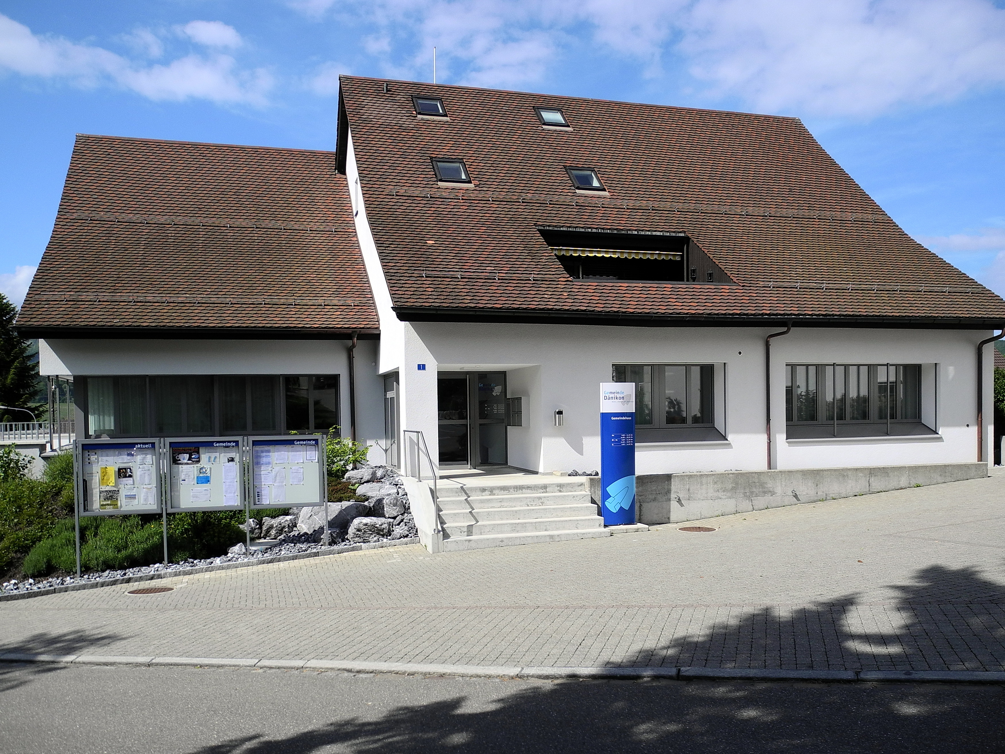 Gemeindehaus, Oberdorfstrasse, Dänikon (Switzerland)